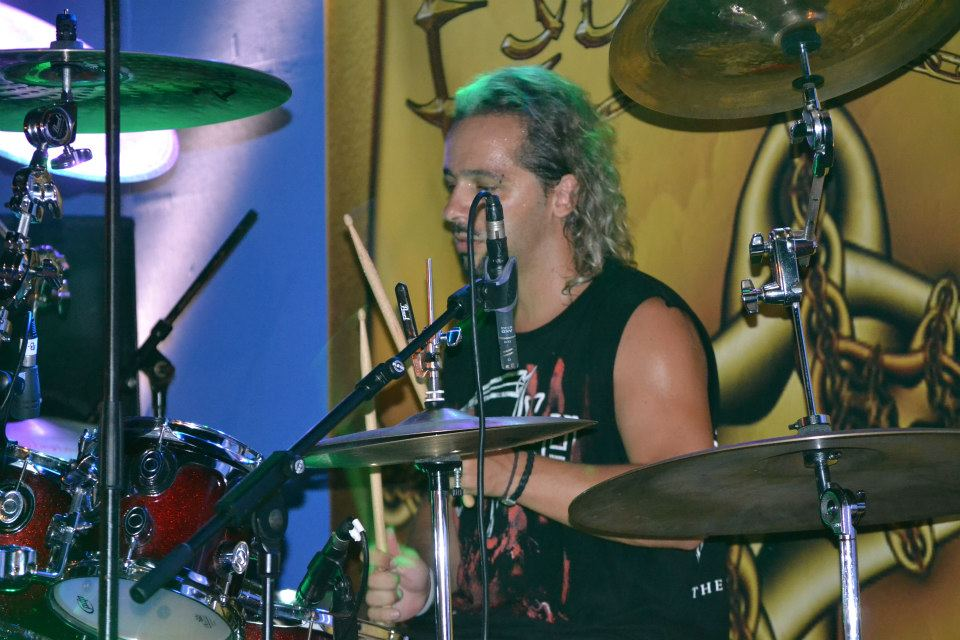 Esclavitud